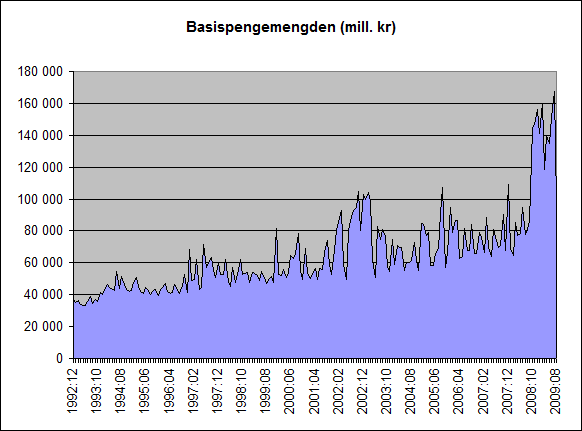 Basispengemengden 1992 - 2009